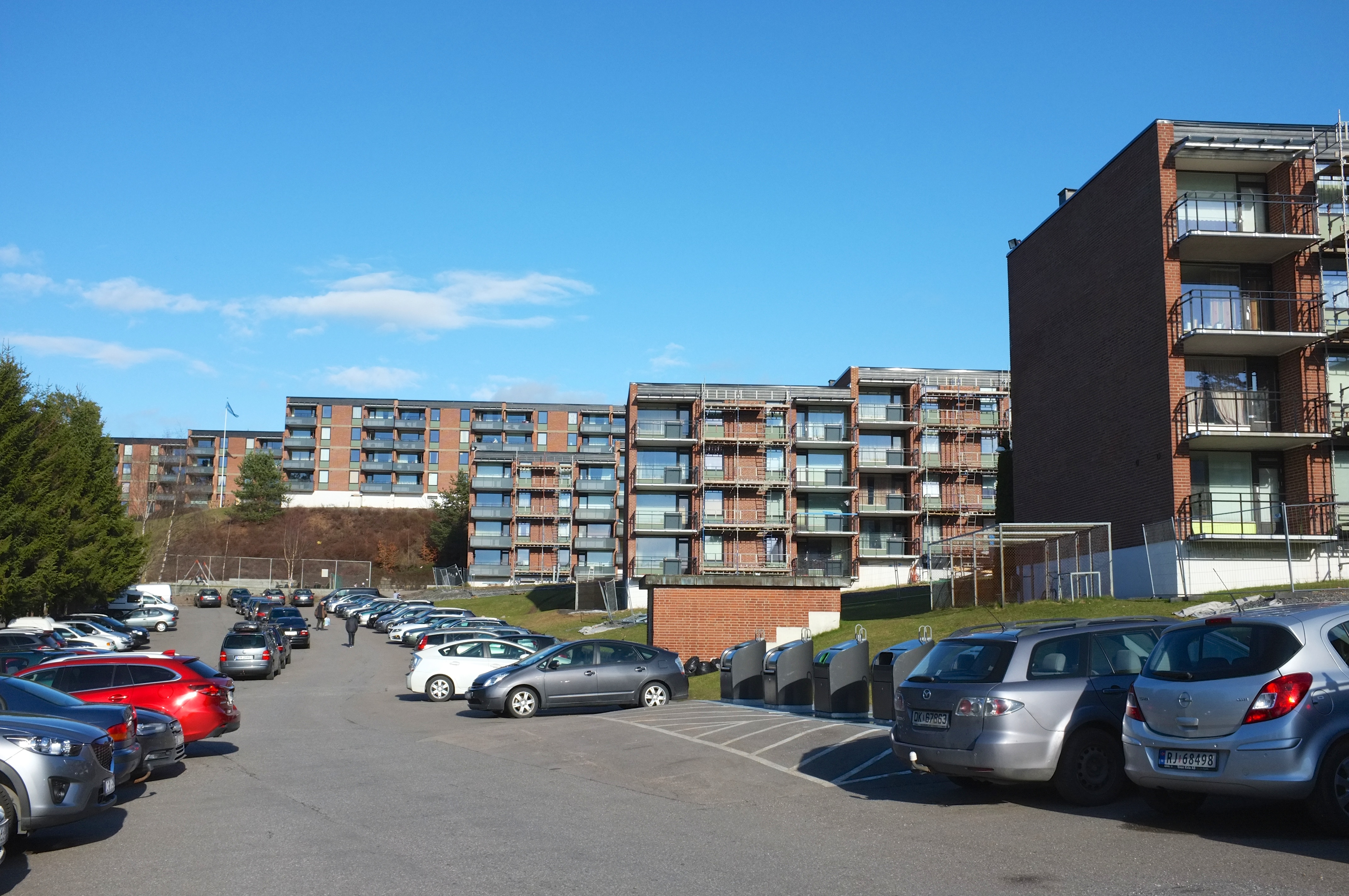 Johan Castbergs vei i Oslo.